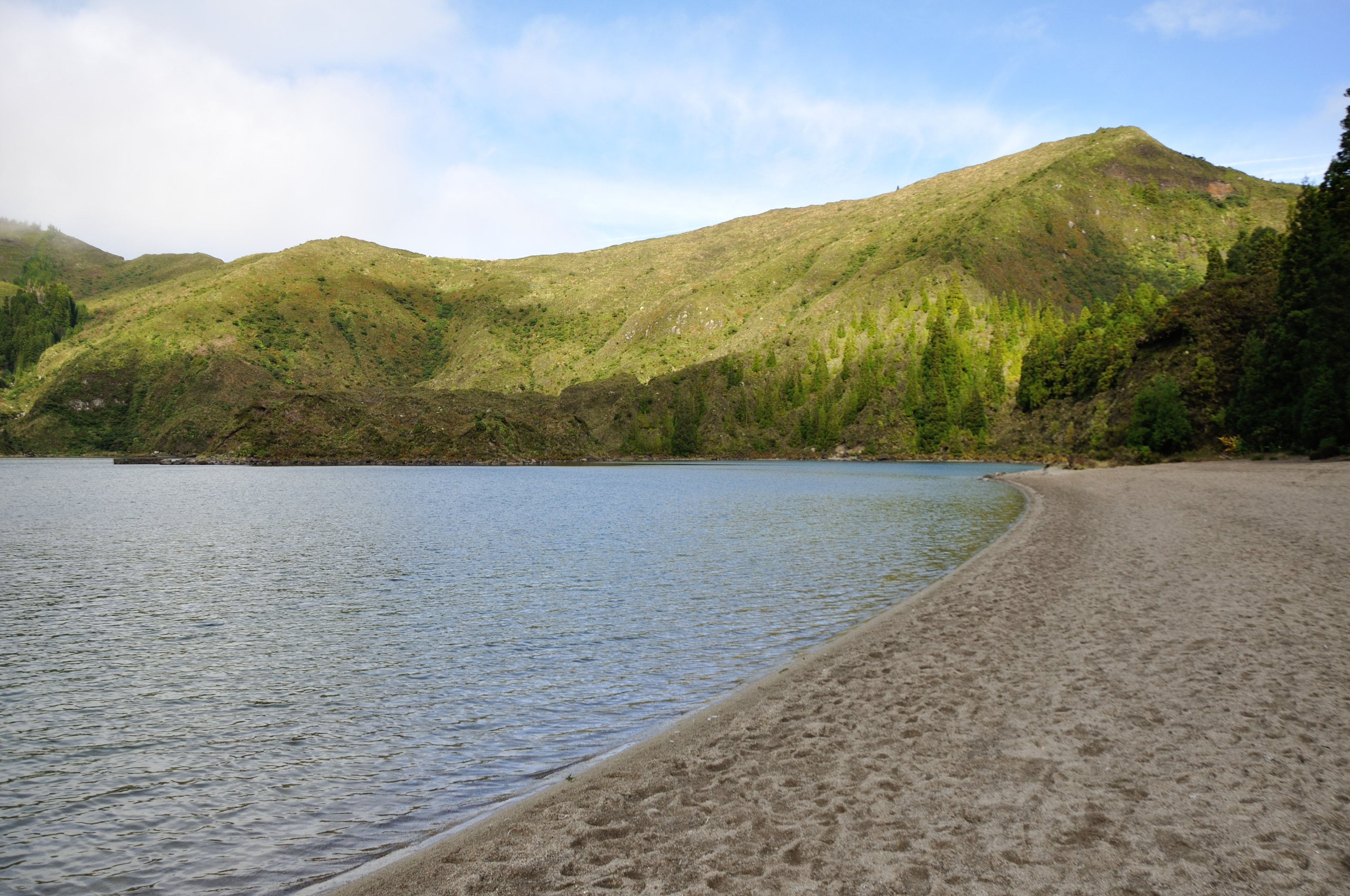 Portugal, hike along Lagoa do Fogo (Azores)